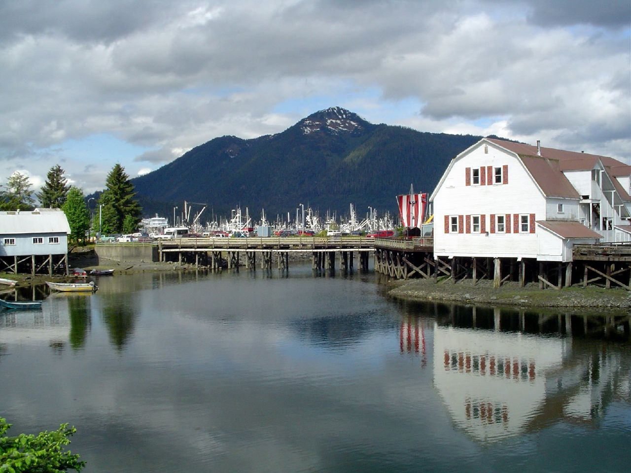 Harbour of Petersburg, Alaska